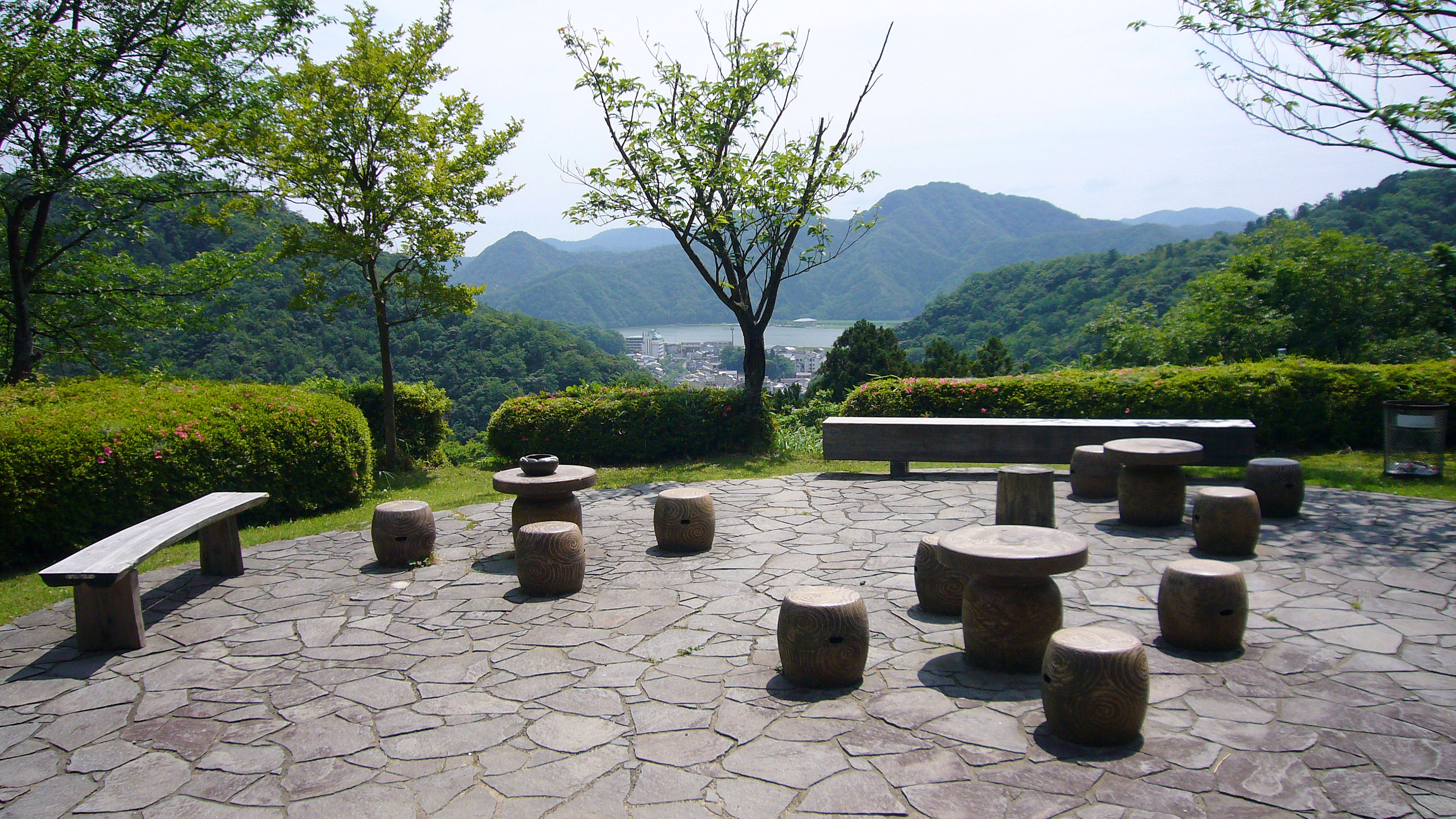 Kinosaki Museum, Kinosaki Onsen in Toyooka, Hyogo, Japan